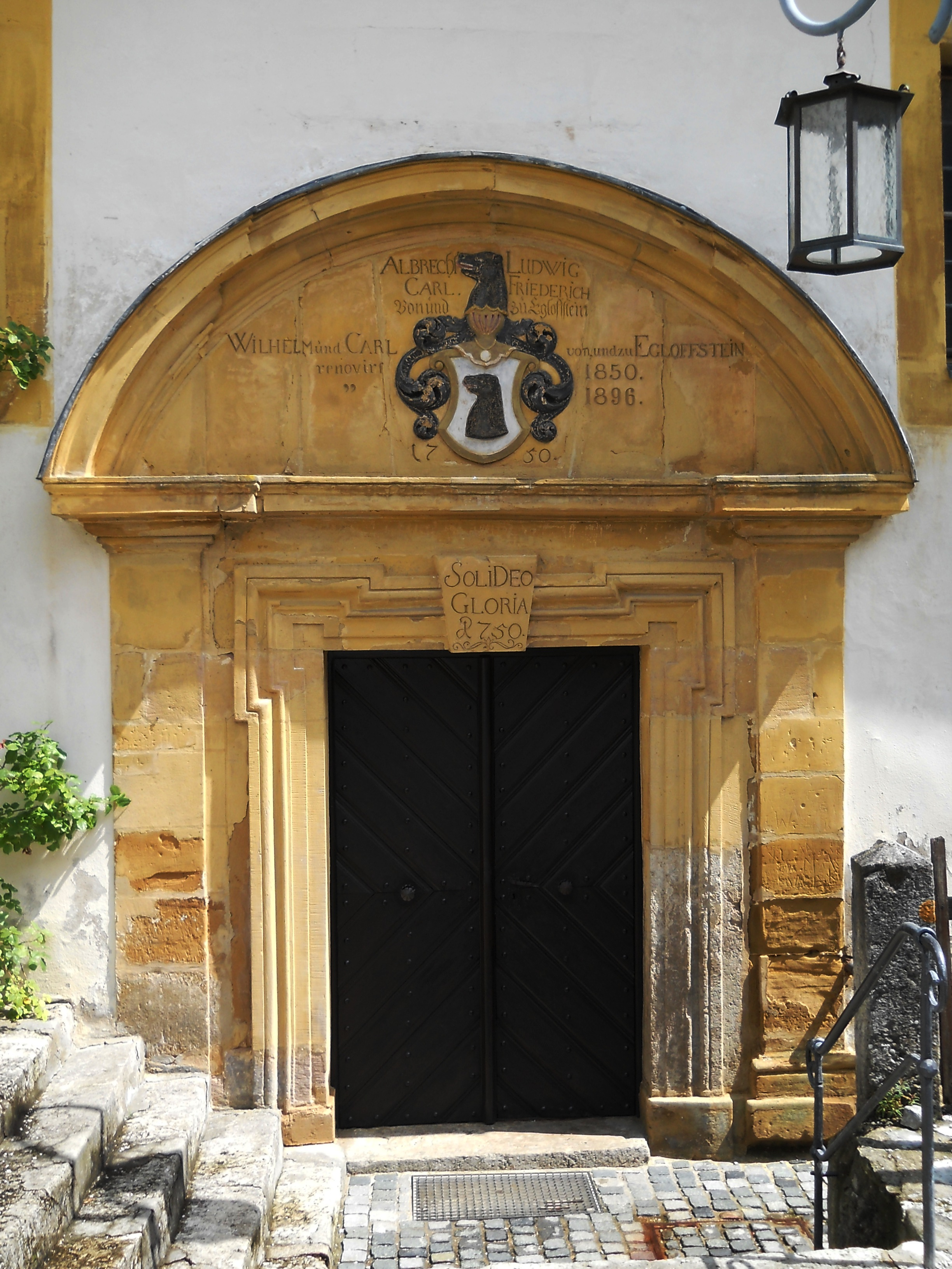 Egloffstein in der Fränkischen Schweiz, Portal der Pfarrkirche St. Bartholomäus (von 1750)